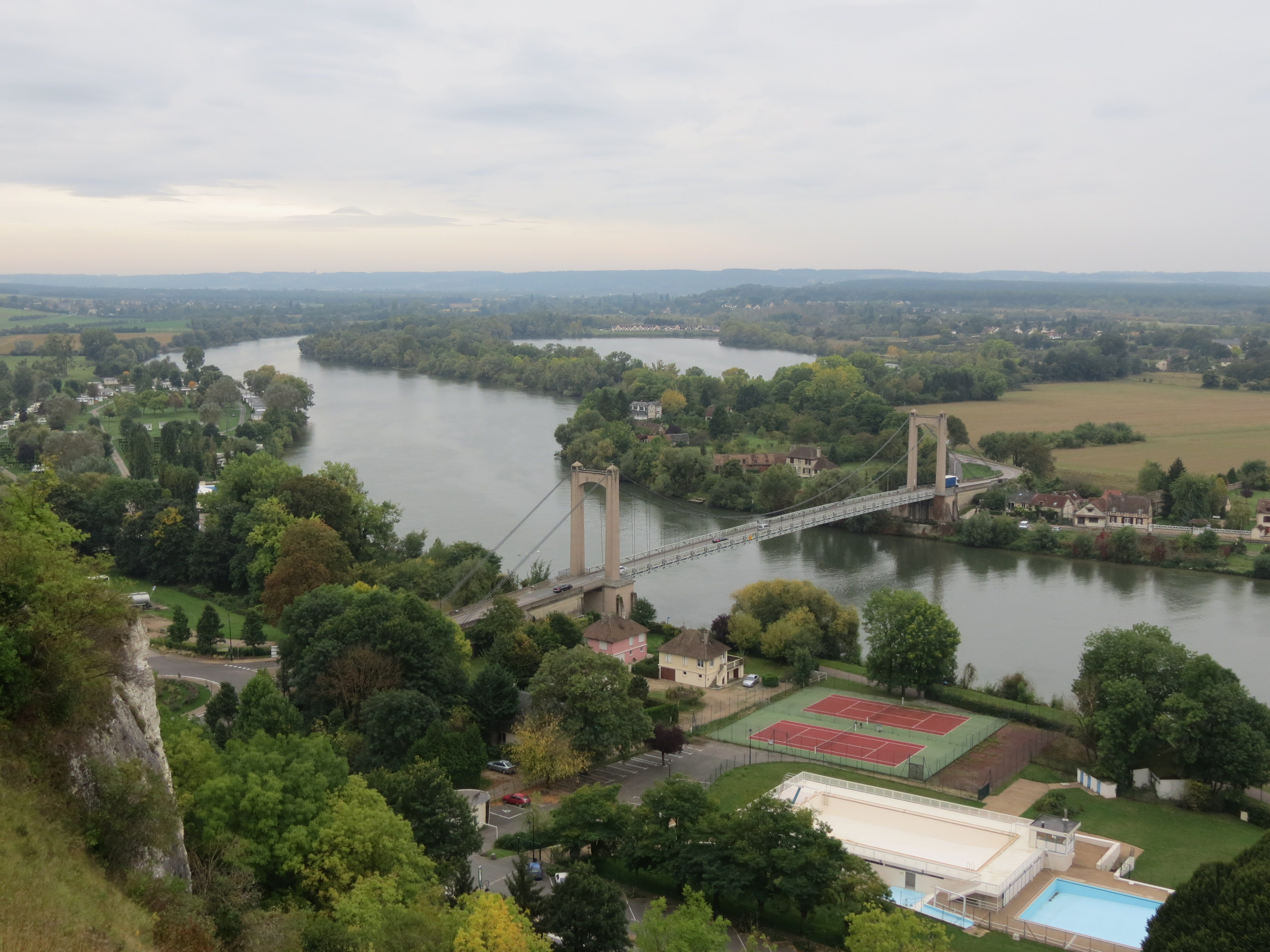 Vue de la Seine et du pont la franchissant depuis Château Gaillard.